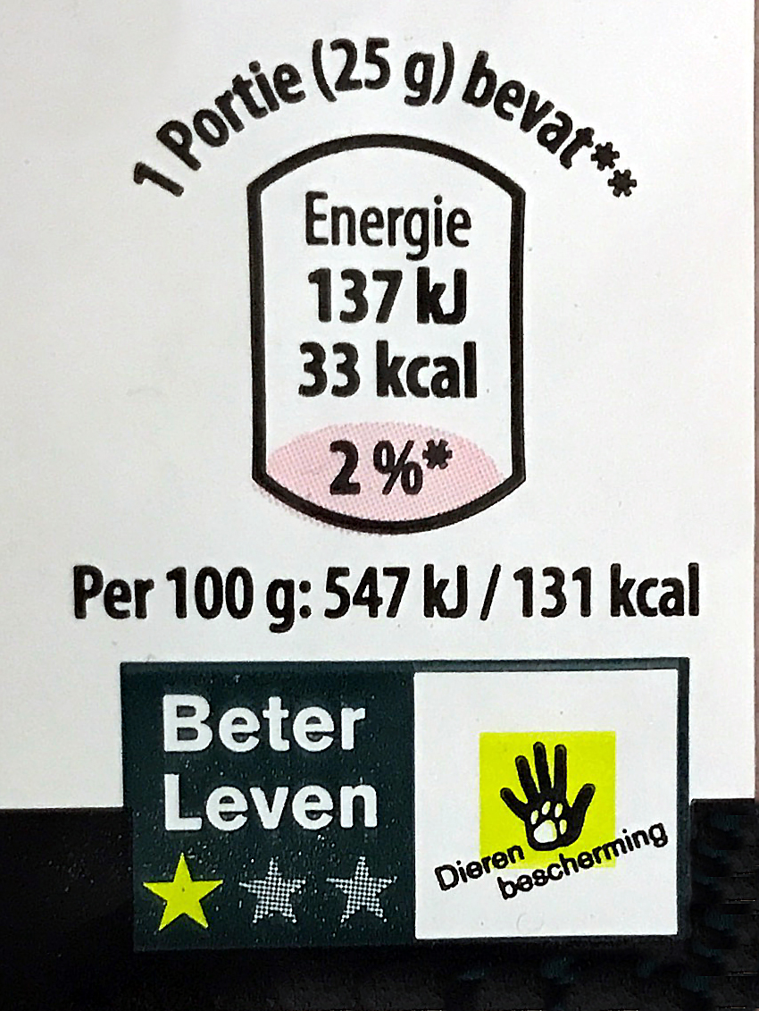 Beter Leven Keurmerk op de verpakking van een pakje Achterham